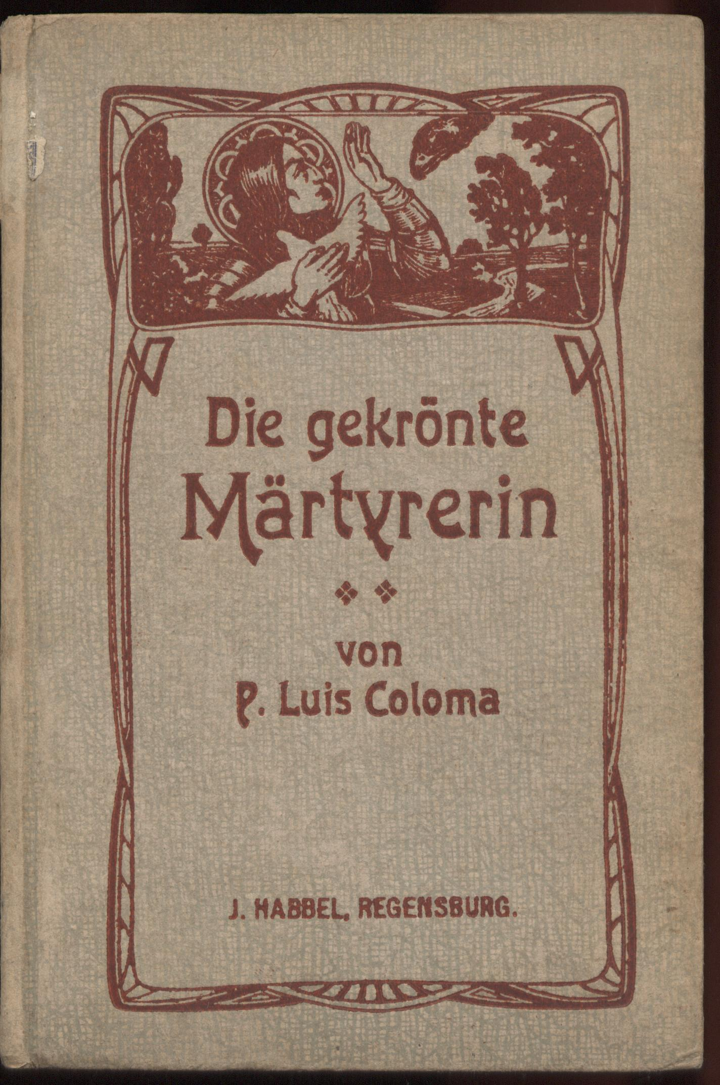 Josef Habbel Regensburg, Buchcover